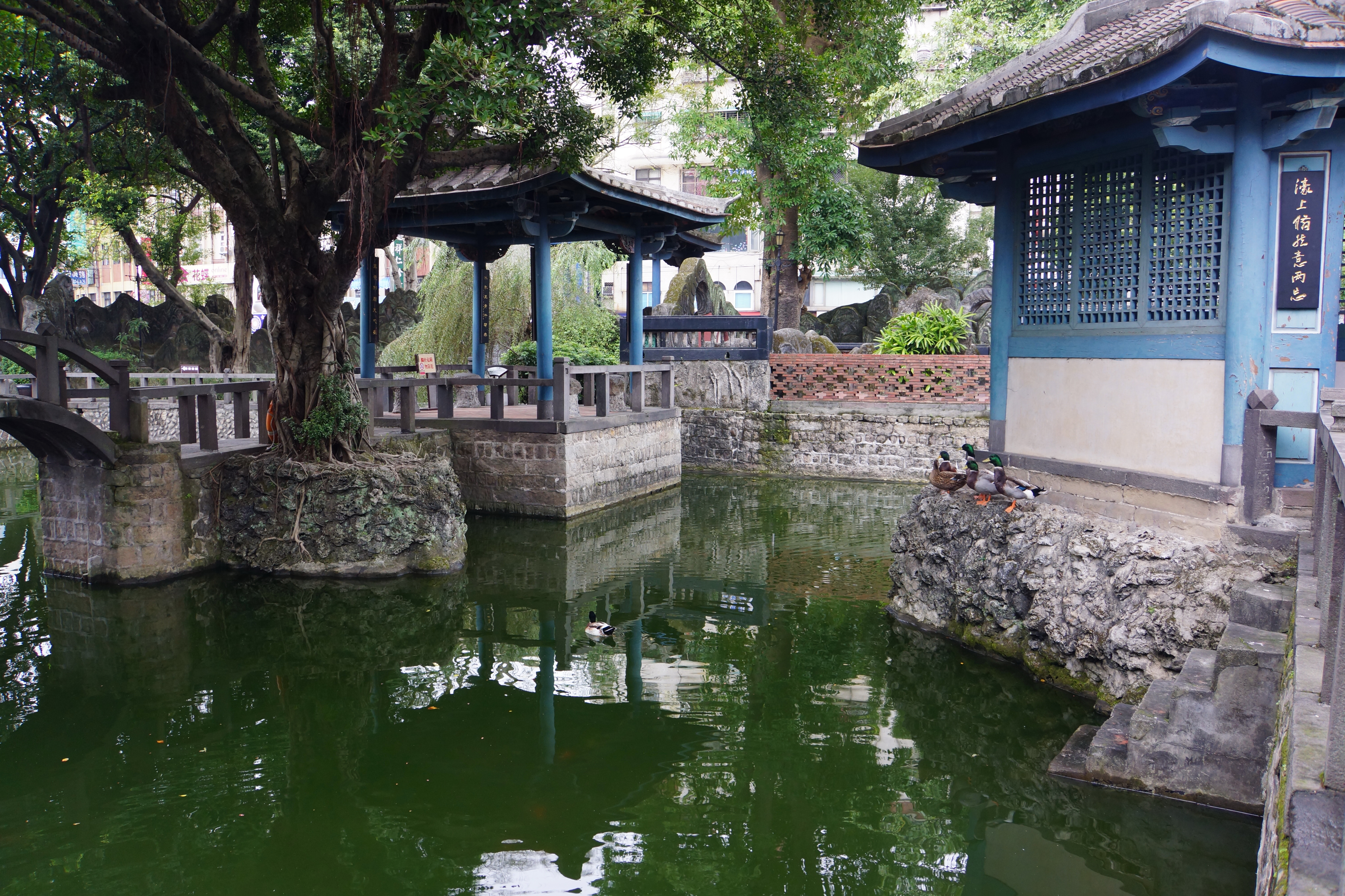 榕蔭大池 Banyan Pond